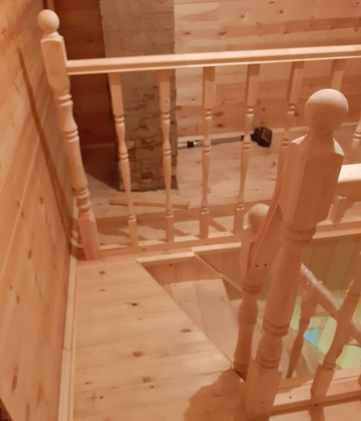 Balusters on the attic stairs of a private house